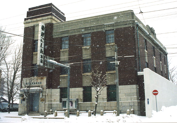 旧十二銀行函館支店（現 函館信用金庫本店、函館市豊川町、設計：木子幸三郎、竣工：1926年）